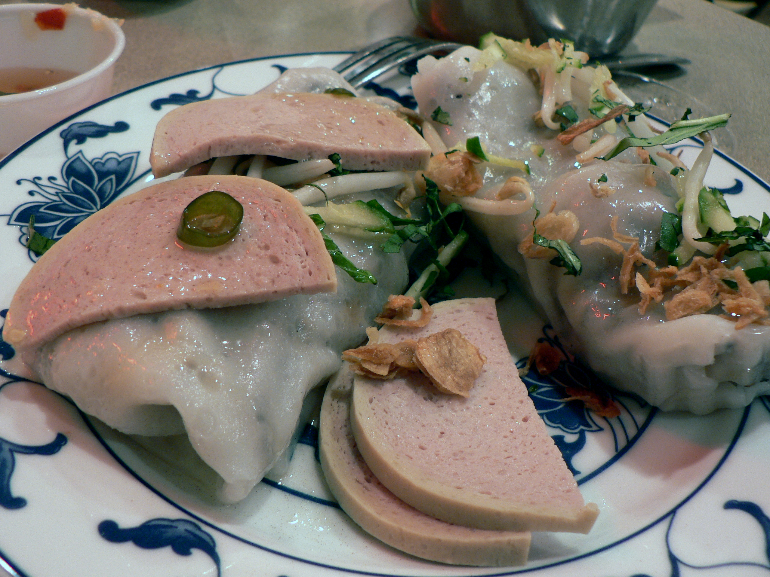 Banh cuon with cha lua.